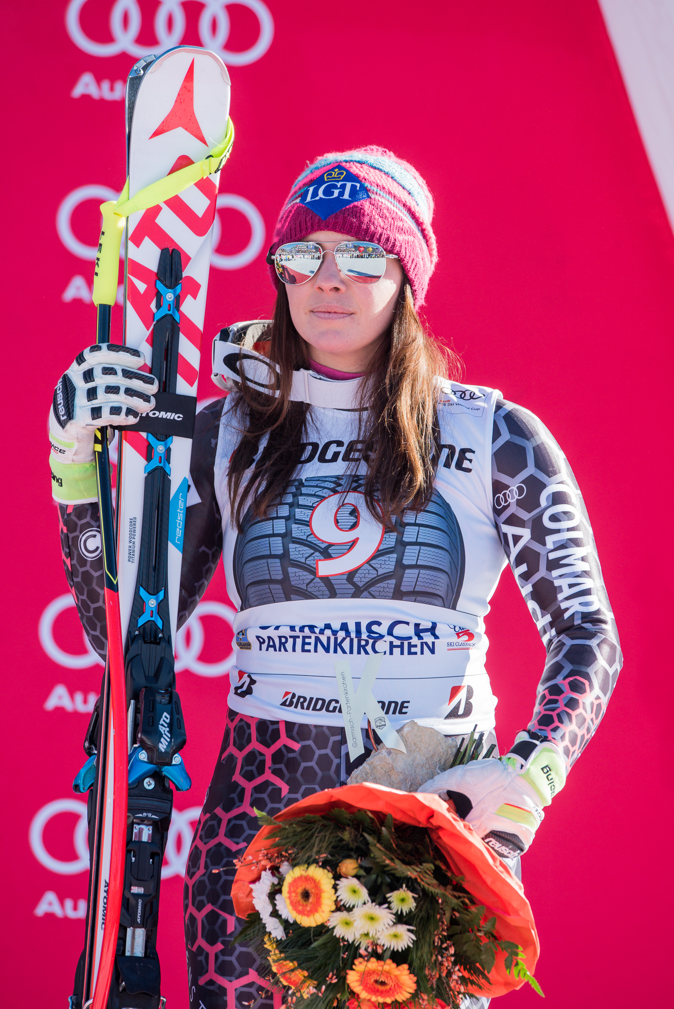 64. Kandahar Rennen,Audi FIS Ski Weltcup Garmisch-Partenkirchen,Damen Super-G,Kandahar,Ladies Super-G,Tina Weirather